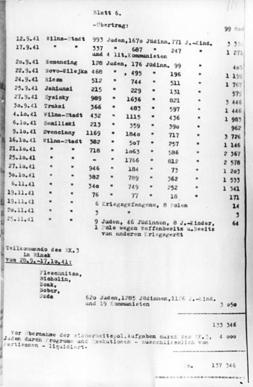 Oberstes Gericht, Globke-Prozess, Beweisstück Zentralbild 16.7.1963 Dokumente über faschistische Greuel aus der UdSSR. UBz: Reproduktion der auszugsweise während des 7. Verhandlungstages des Globke-Prozesses am 15. Juli verlesenen Dokumente über faschistische Greuel in der Sowjetunion. Pedantisch genau zieht hier ein SS-Standartenführer Jäger die grausige Bilanz: "In Litauen gibt es keine Juden mehr." (siehe auch 2 - 6 u. 8 - 10N)